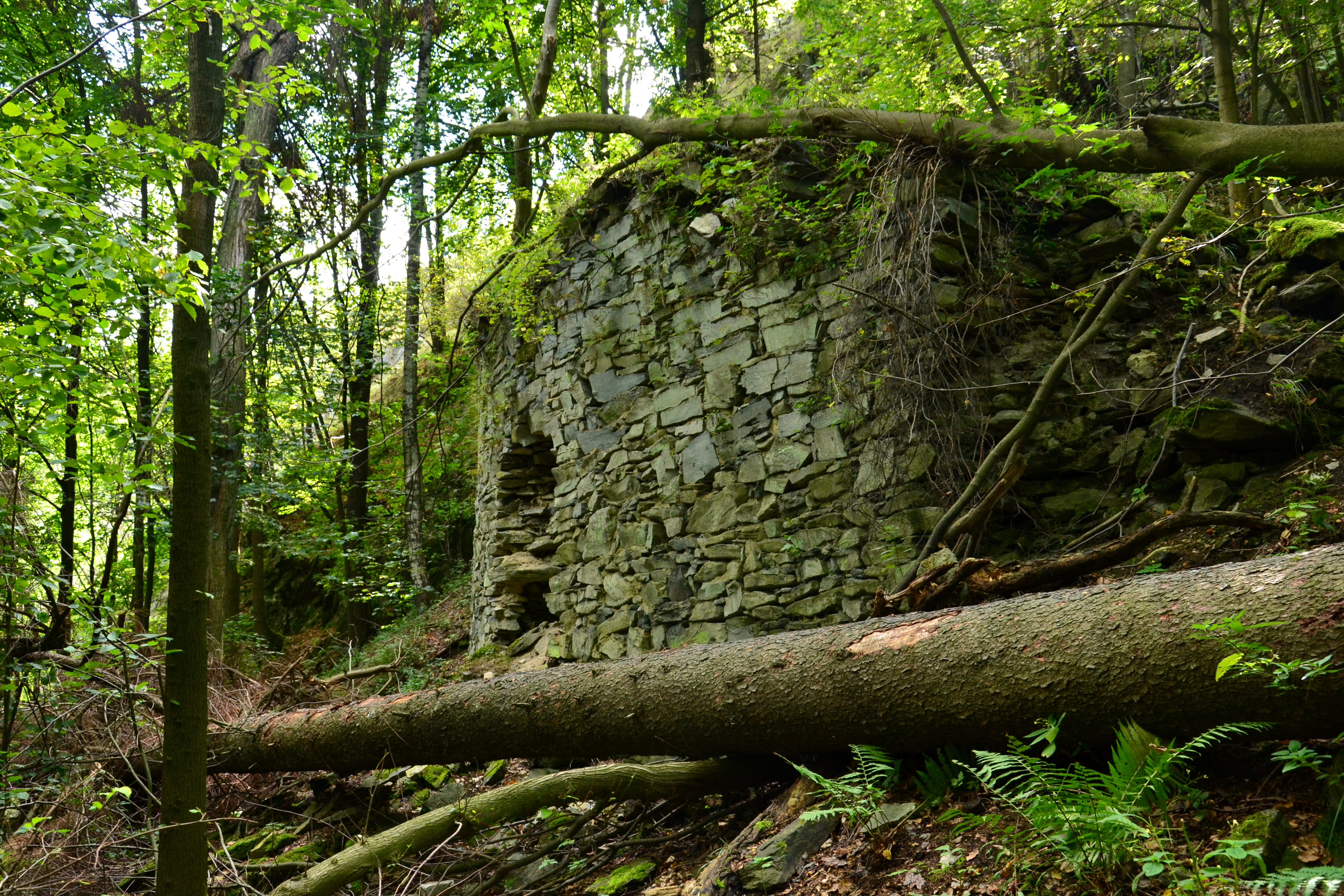 Hrad Pustý zámek, Mlýny (Kytlice) – fragment zdiva na východní straně